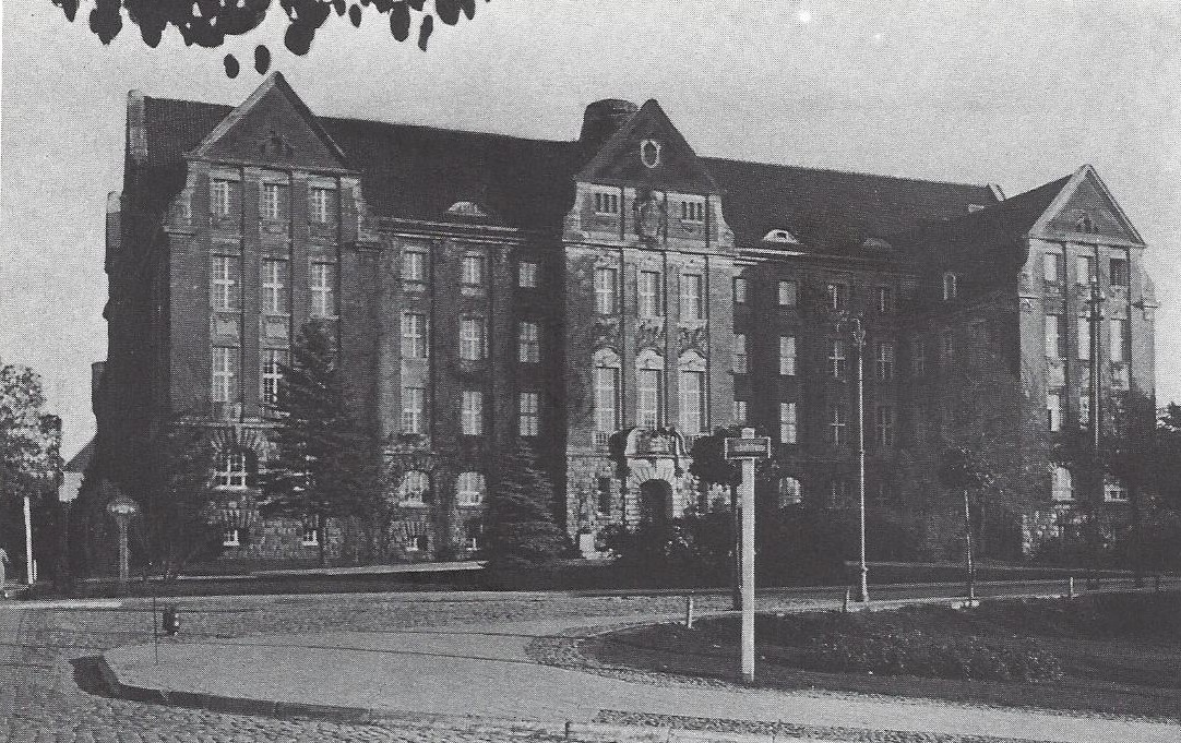 Gebäude der Regierung des Regierungsbezirks Allenstein